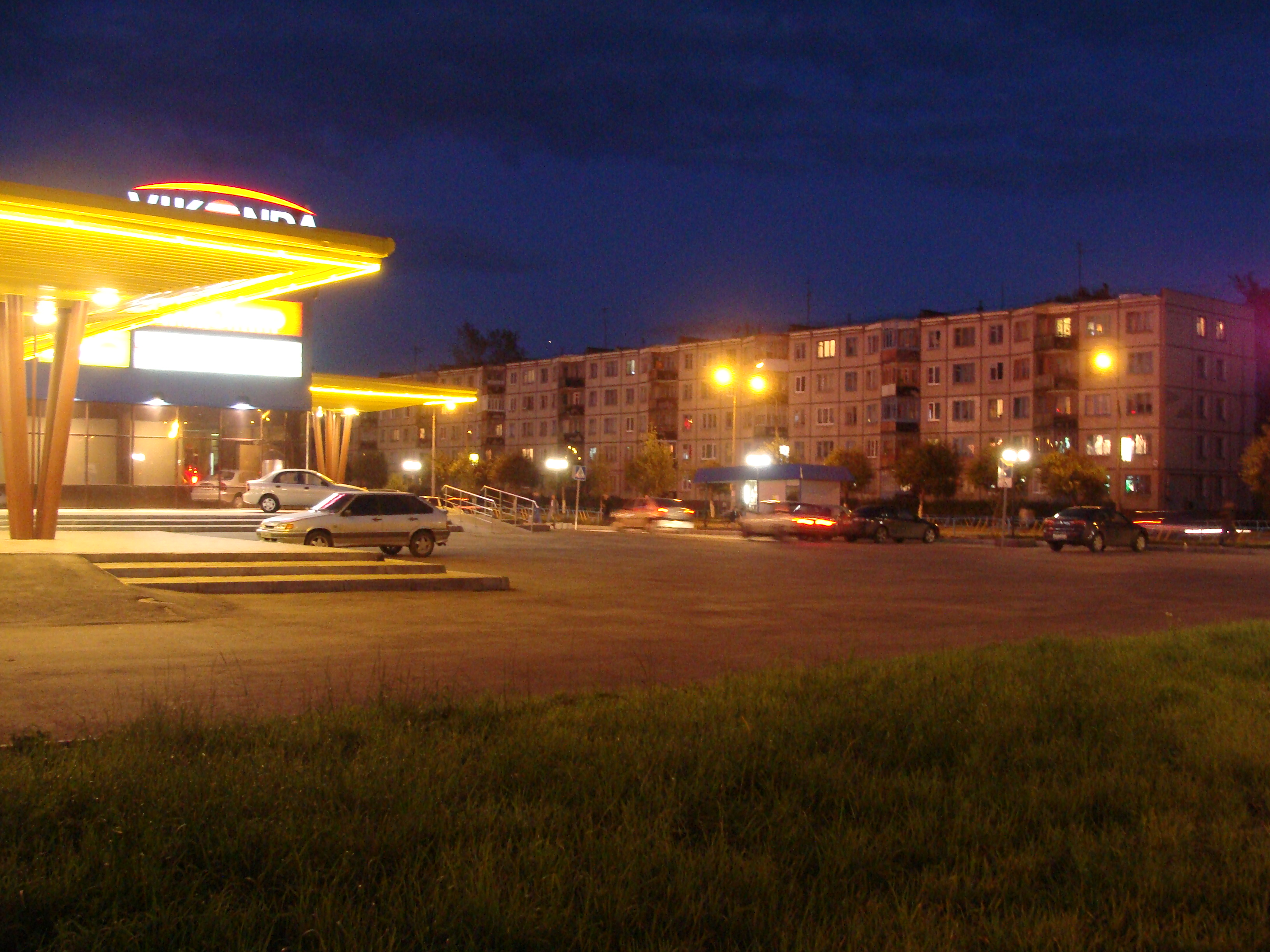 Виконда и пр. Ленина, Коряжма